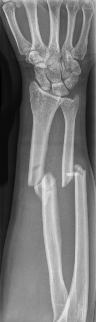 Komplette Unterarmfraktur mit deutlicher Verschiebung der Fragmente.